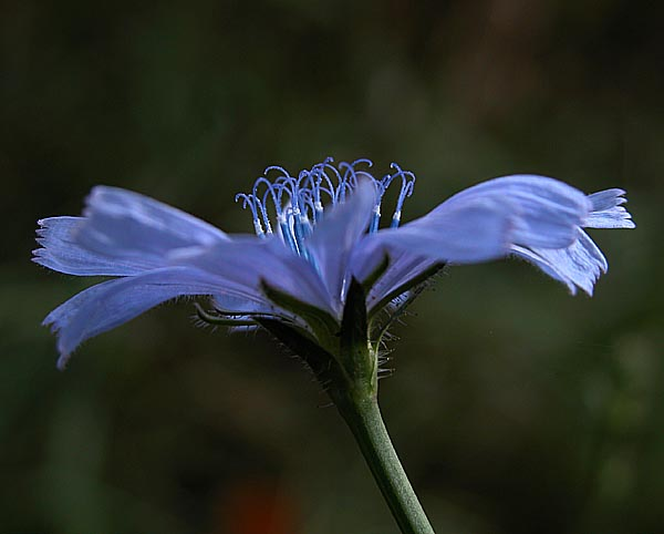 Gemeine Wegwarte (cichorium intybus), aufgenommen in Buseck